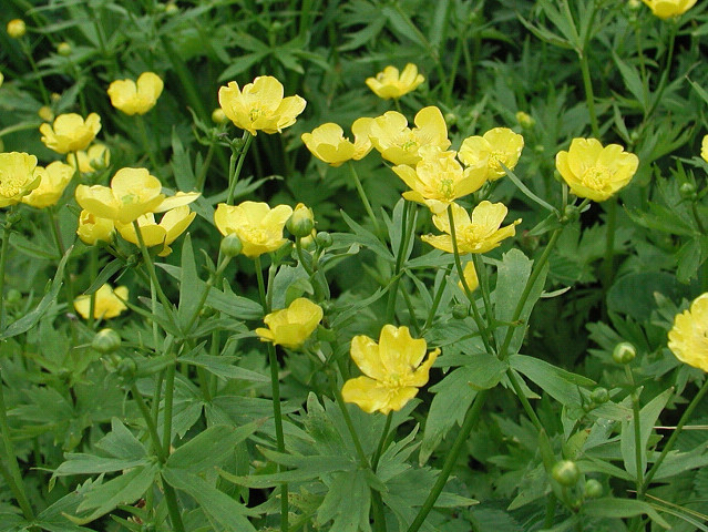 ミヤマキンポウゲ (山形県月山)Ranunculus acris var. nipponicus (Mt.Gassan, Yamagata, JAPAN)